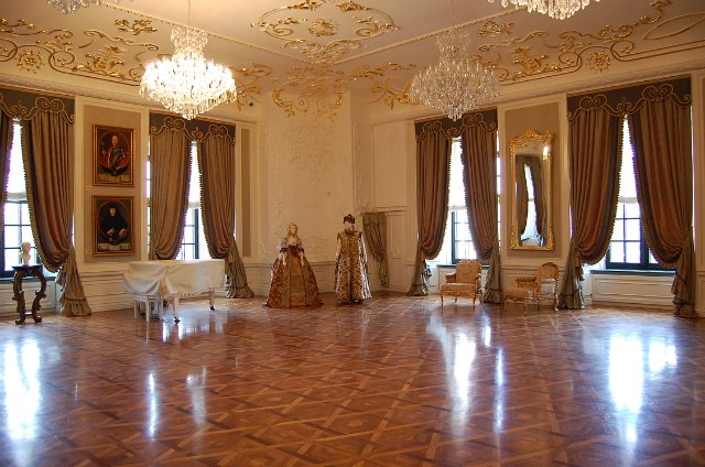 Мірскі замак. Бальная зала